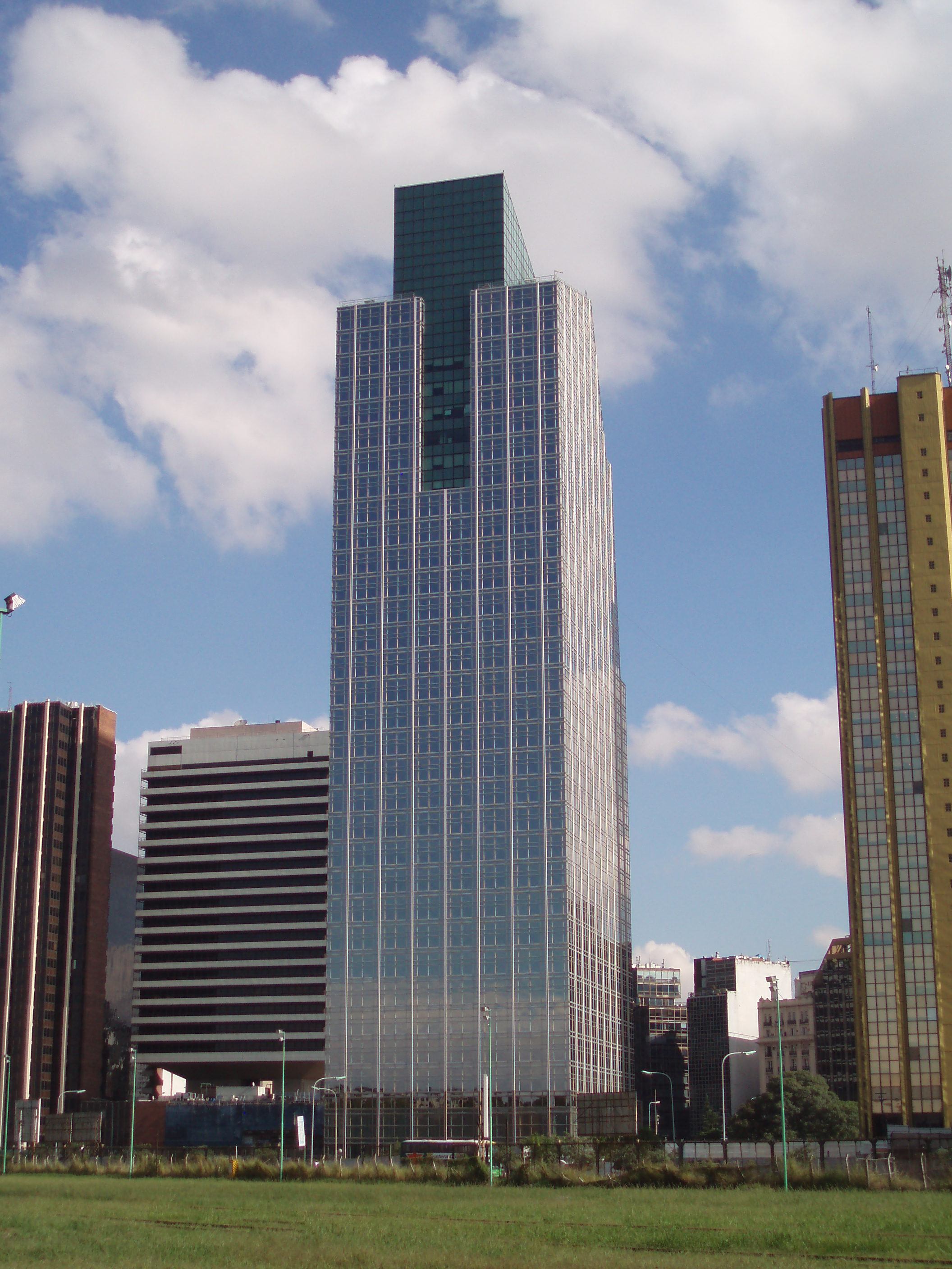 Torre BankBoston desde Av. Moreau de Justo, Buenos Aires